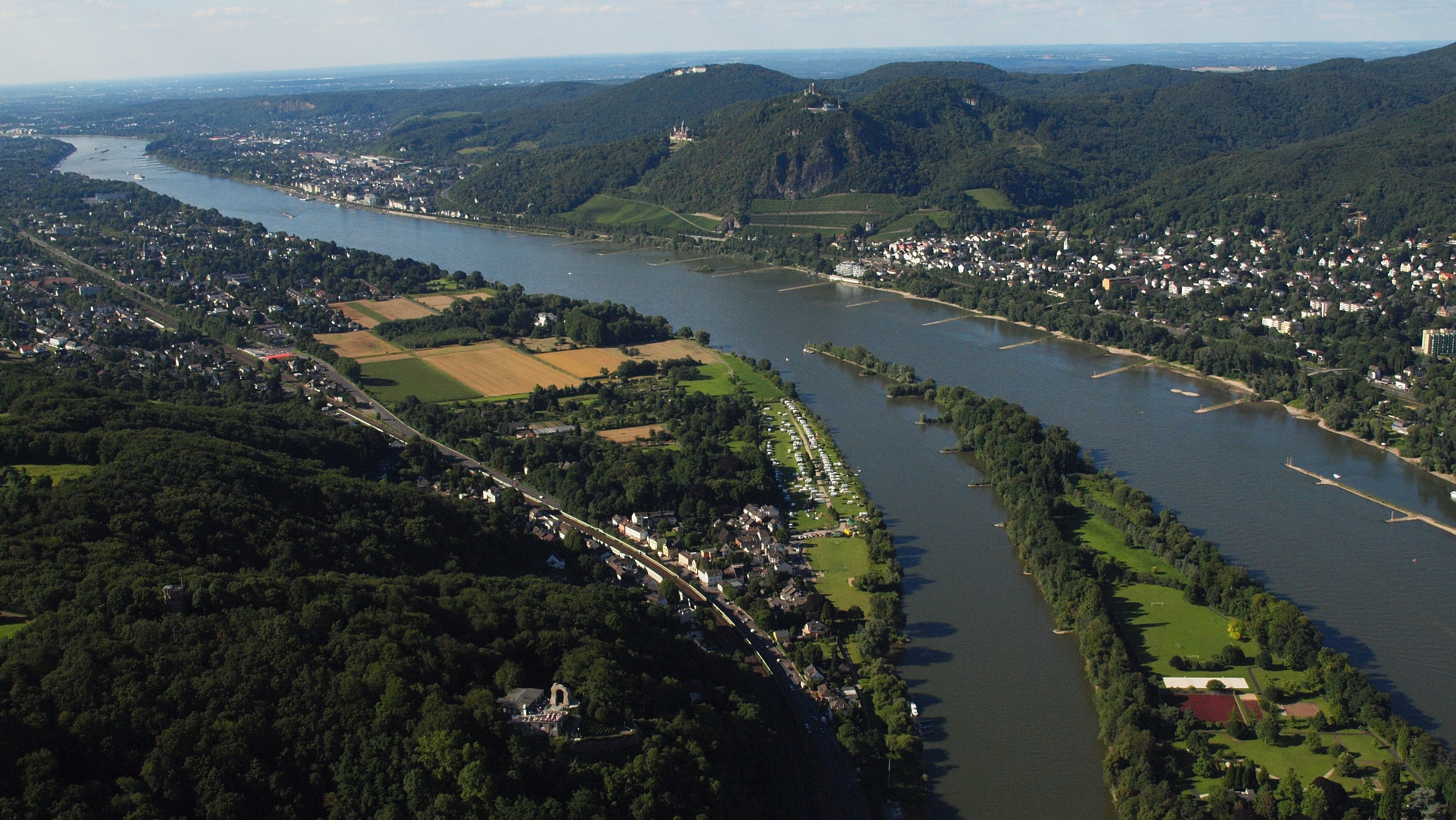 Rhein bei Bad Honnef und Rolandswerth, Siebengebirge, Luftaufnahme aus Süden; vorne: südlicher Beginn des Godesberger Rheintaltrichters, rechts: Honnefer Talweitung